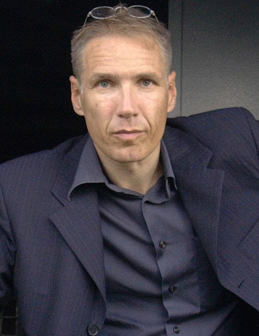 Andreas Coerper 2003